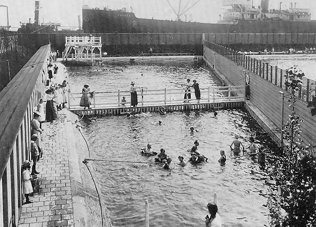 Zwembad De Kous in de Koushaven in Rotterdam. Foto uit nl:1913, fotograaf onbekend.